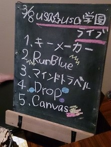 amiinaセトリボード(20150308(1))